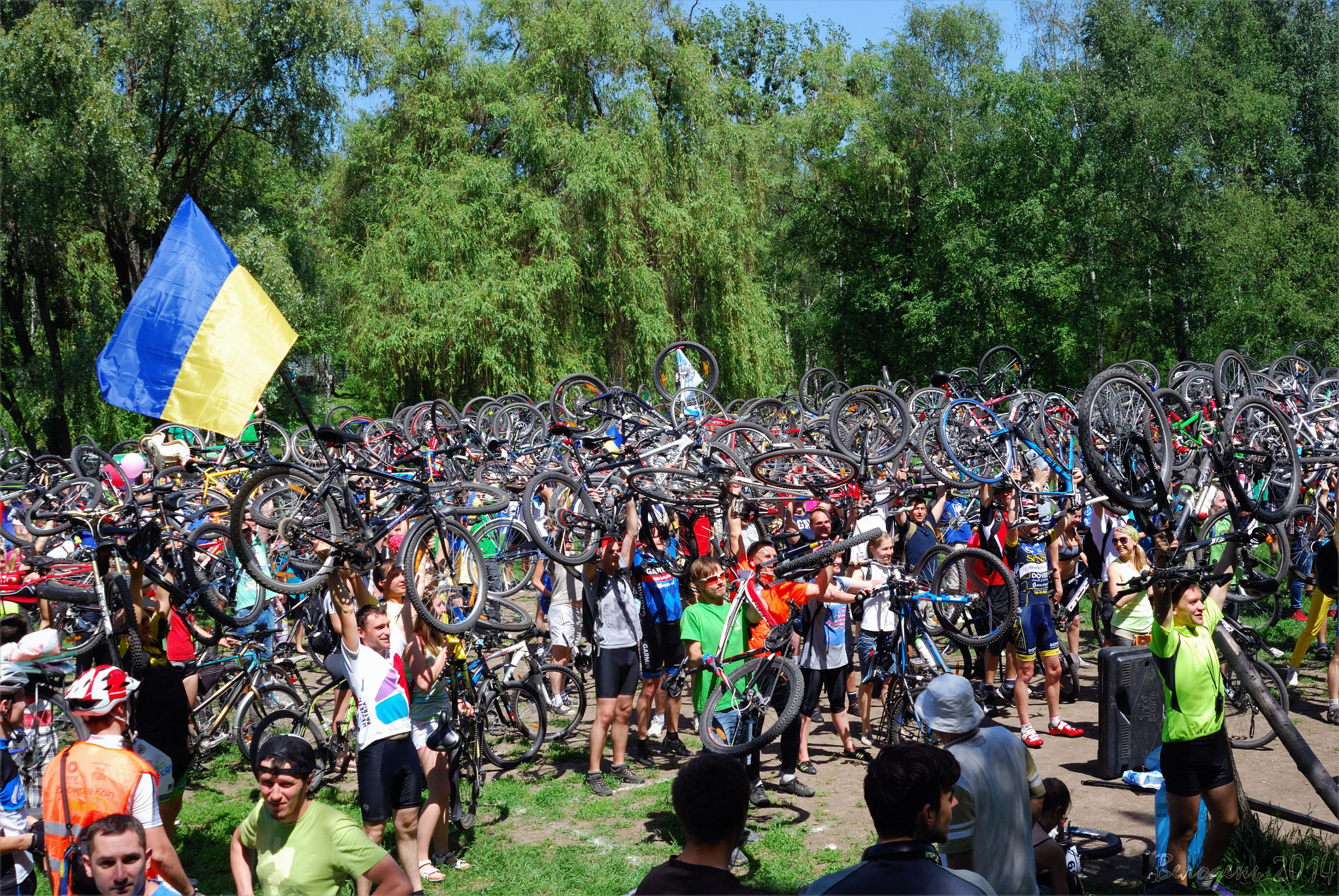 Велодень Полтава 2014